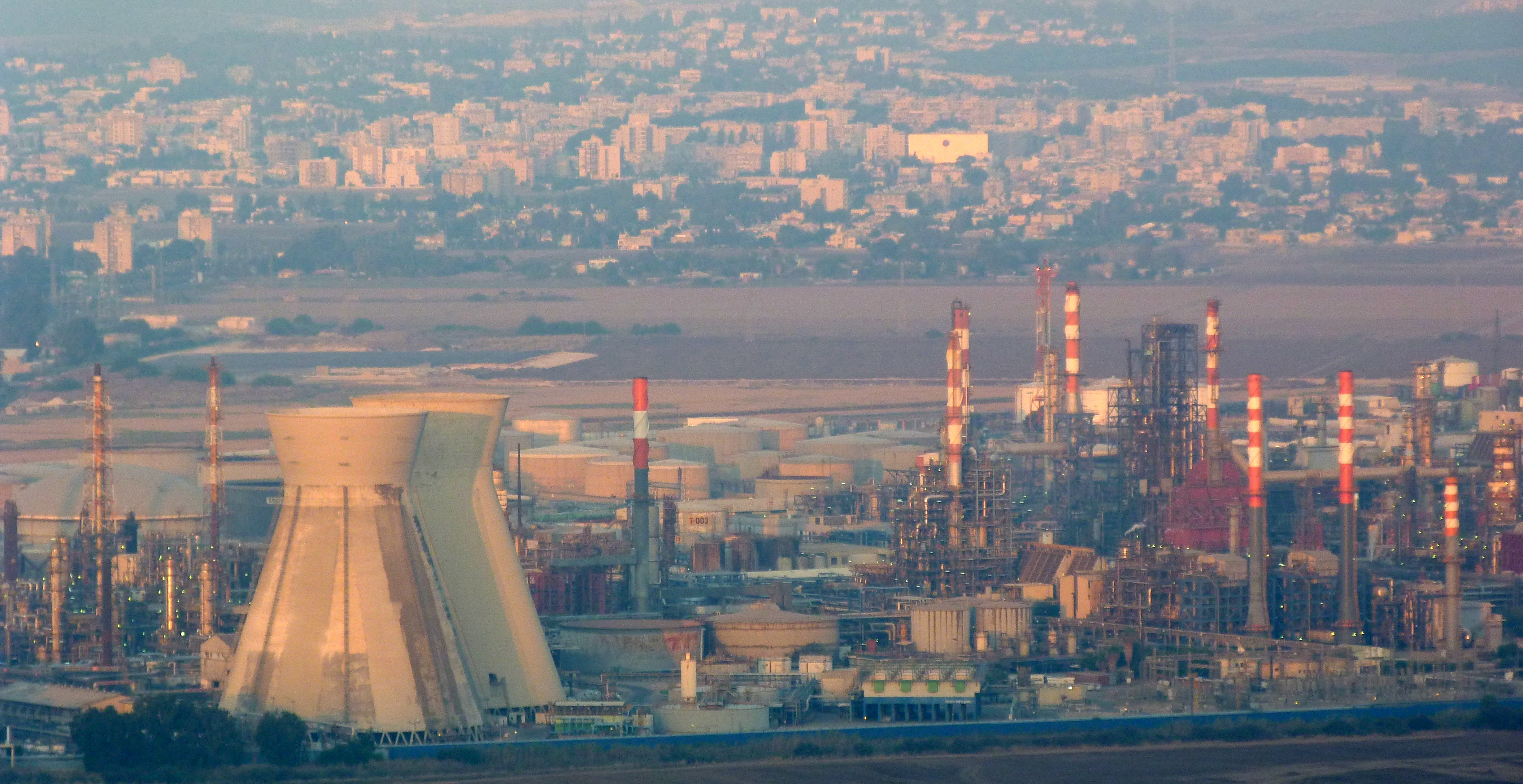 הלבניות, מתחם בז"ן, מפרץ חיפה